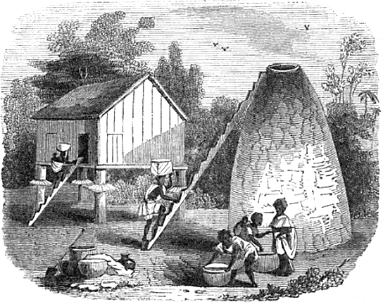 buildings of the bezanozano